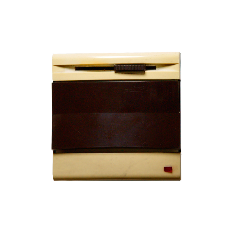 Ściemniacz RS-2, 1975 rok. Ówczesna nazwa producenta: Południowe Zakłady Przemysłu Elektrotechnicznego „POLAM – KONTAKT” z siedzibą w Czechowicach - Dziedzicach.